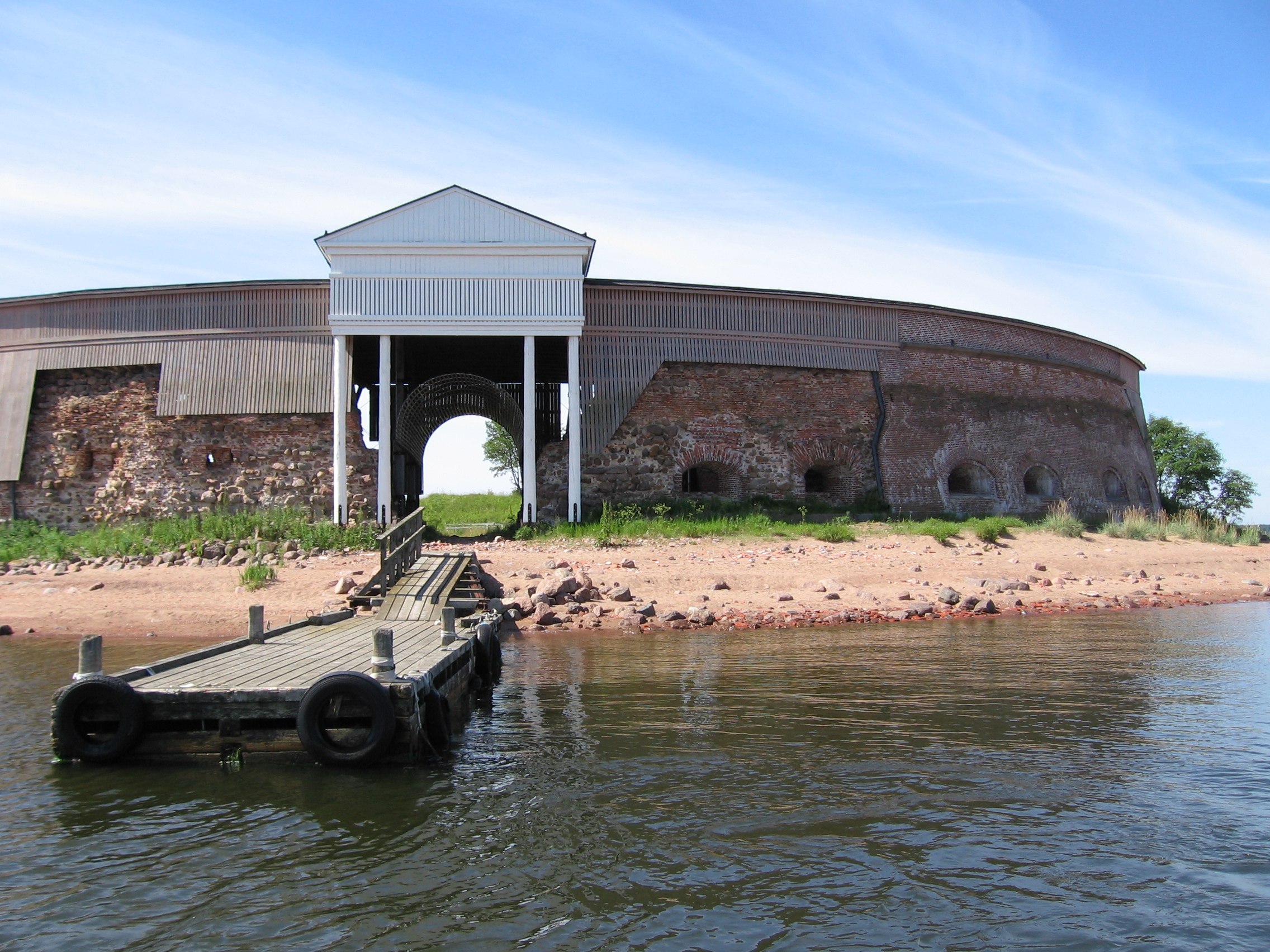 Fort Slavan linnake Kukourin saarella Kotkassa.